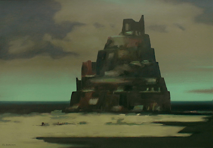 Benedek Jenő, ifj. (Csongrád, 1939. június 13.– 2019. augusztus 20.) festőművész alkotása: Bábel, 2000, olajfestmény, 70x100 cm